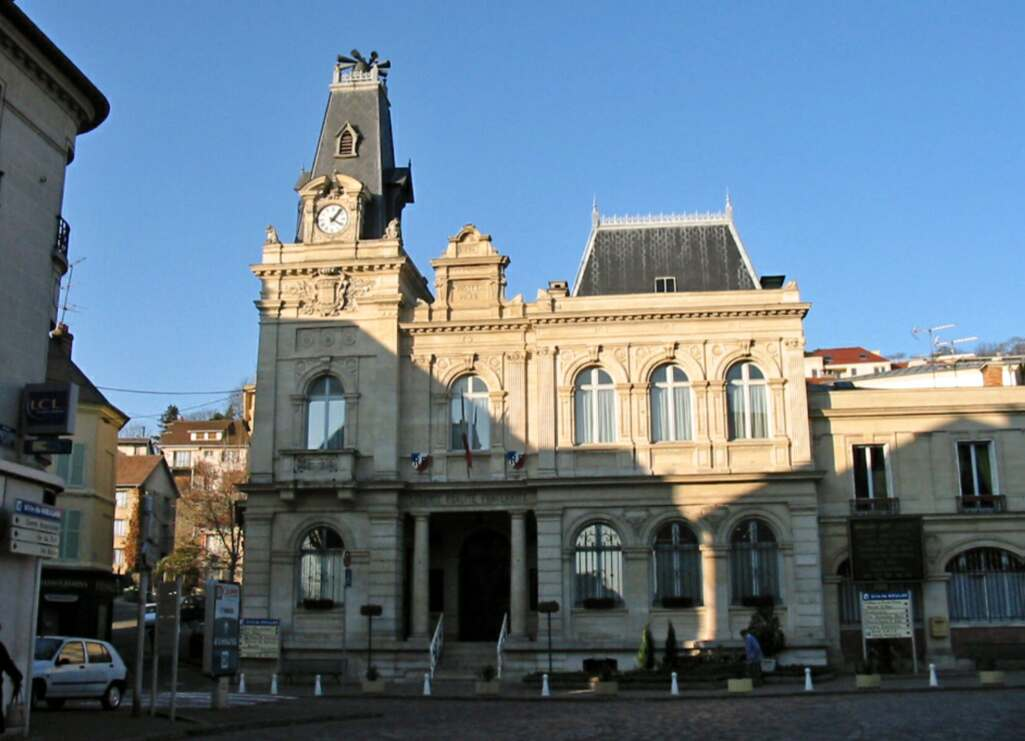 Mairie de Meulan (Yvelines) Photo JH Mora, janvier 2006